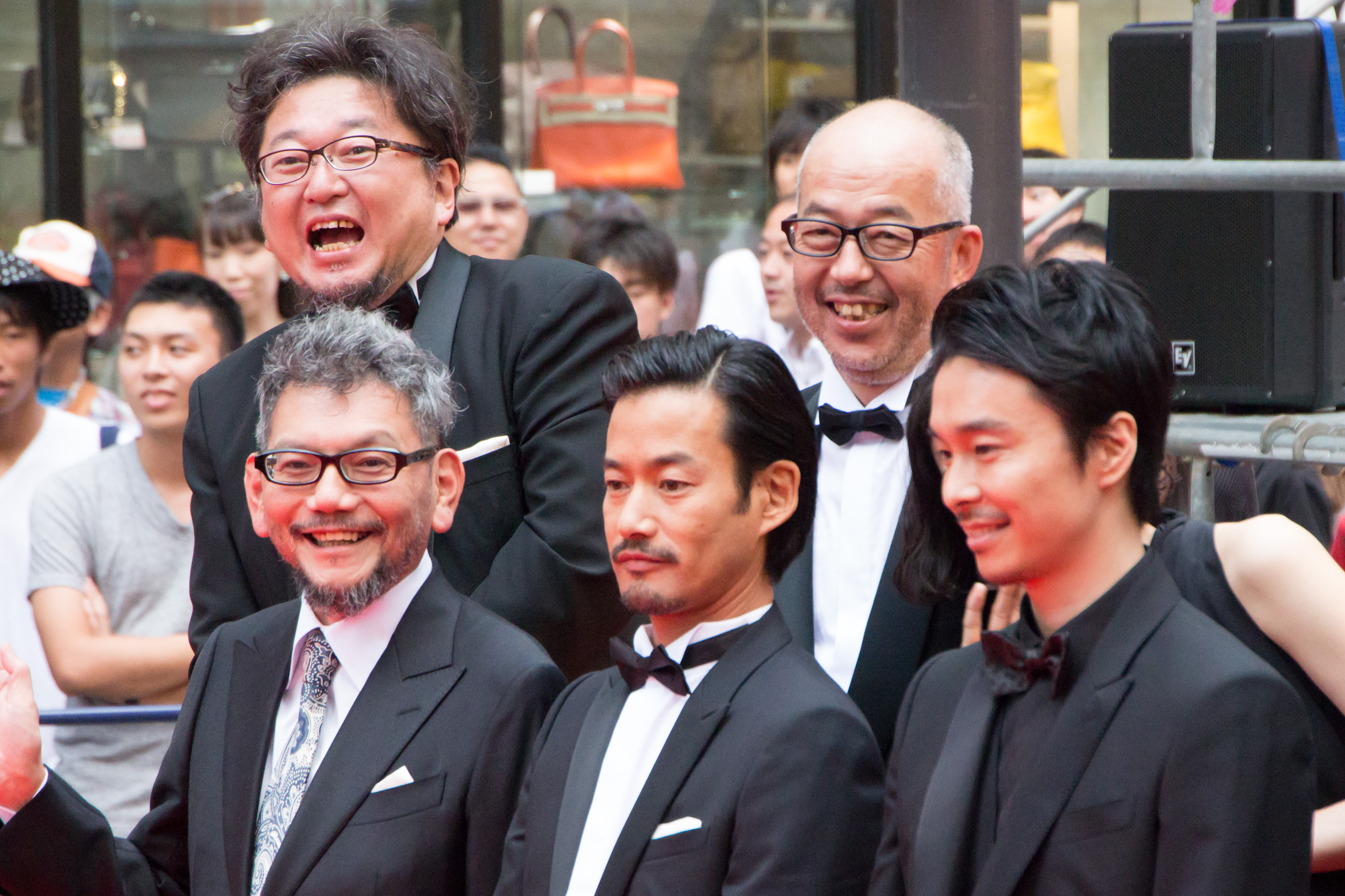 シン・ゴジラ ワールドプレミア レッドカーペットイベント 長谷川博己 竹野内豊 庵野秀明 樋口真嗣 尾上克郎